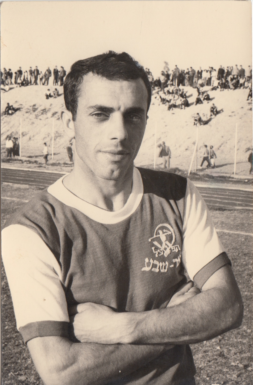 יצחק גוזלן בתקופת הכדורגל בקבוצת 'הפועל באר-שבע'